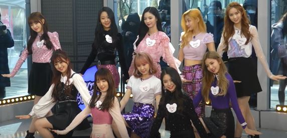 29일 오후 서울시 마포구 상암동 tbs 오픈스튜디오에서 팩트인스타 스타인터뷰가 열려 체리블렛(해윤, 유주, 미래, 보라, 지원, 코코로, 레미, 채린, 린린, 메이)이 녹화에 참여해 포즈를 취하고 있다. 1.팩트인스타 #체리블렛 #CherryBullet #해윤 #유주 #미래 #보라 #지원 #코코로 #레미 #채린 #린린 #메이 팩트인스타, 체리블렛, Cherry Bullet, 해윤, 유주, 미래, 보라, 지원, 코코로, 레미, 채린, 린린, 메이